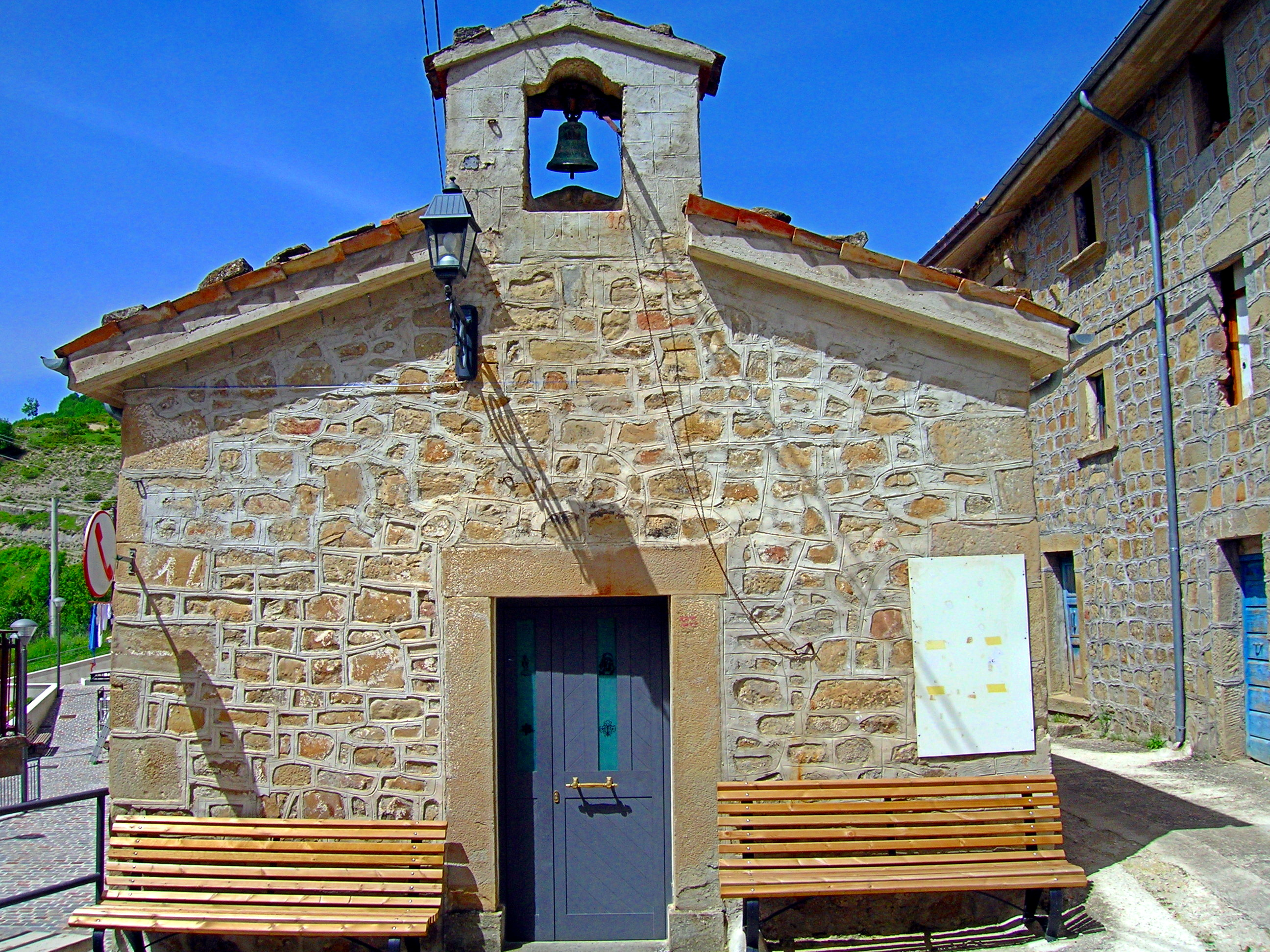 Chiesa di Riano, Rocca Santa Maria (TE)